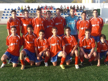 Cadetes del C.D. Huéscar, un equipo de la provincia de Granada (España)